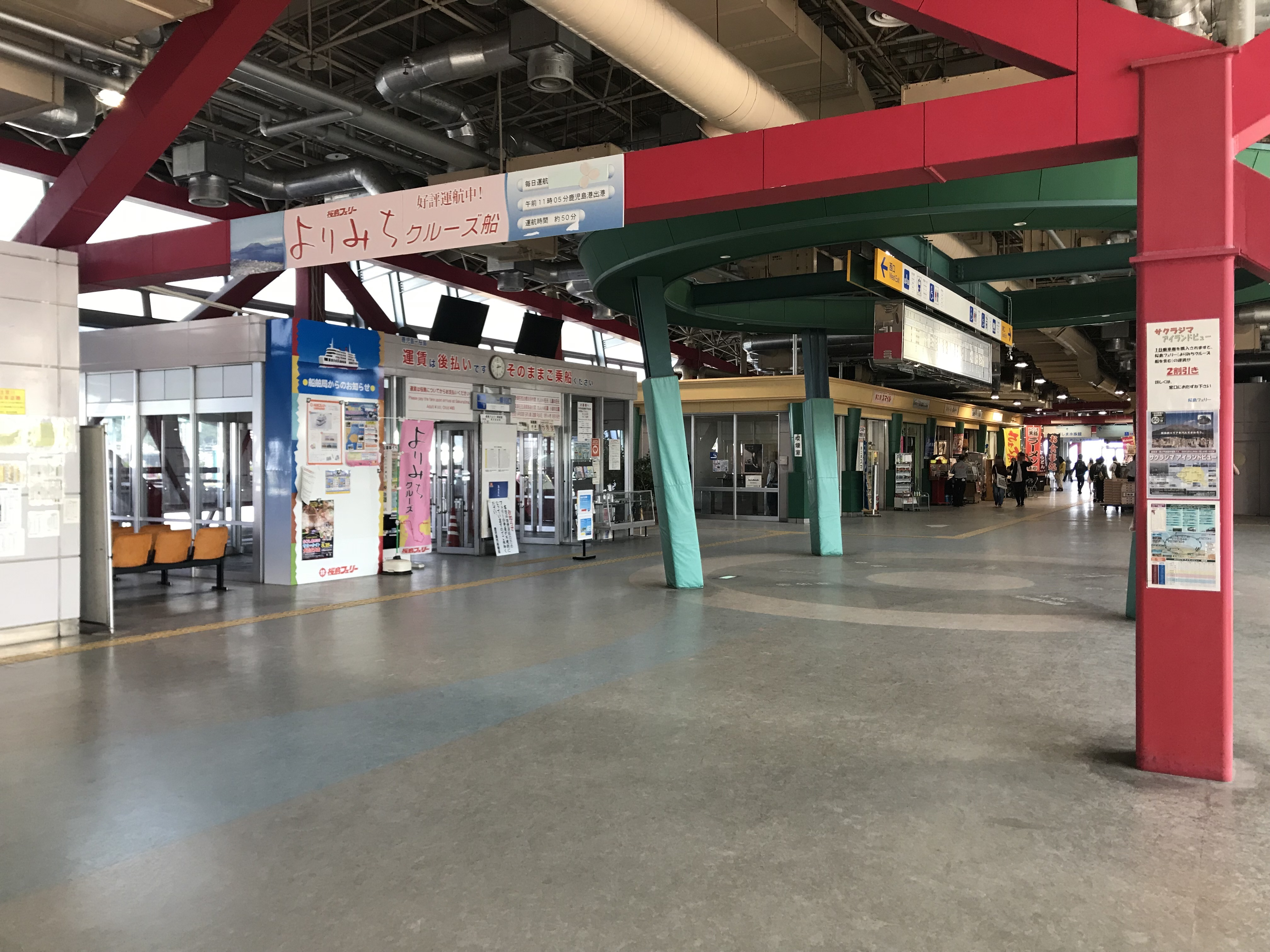 鹿児島港桜島フェリーターミナル